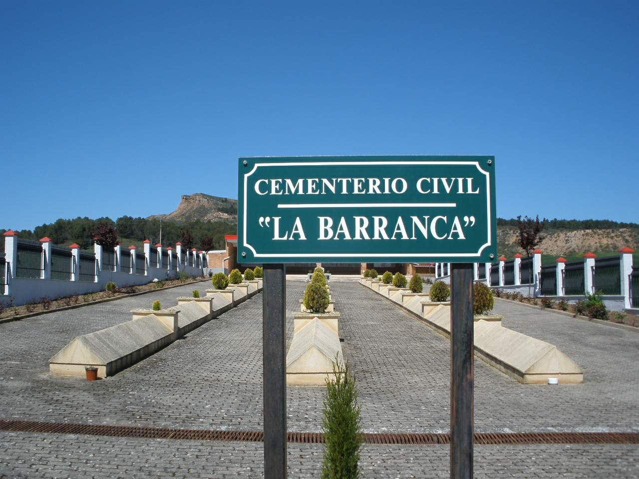 Cementerio Civil 'La Barranca', en Lardero, La Rioja. Acoge los restos de los represaliados del bando franquista en la zona durante la Guerra Civil Española